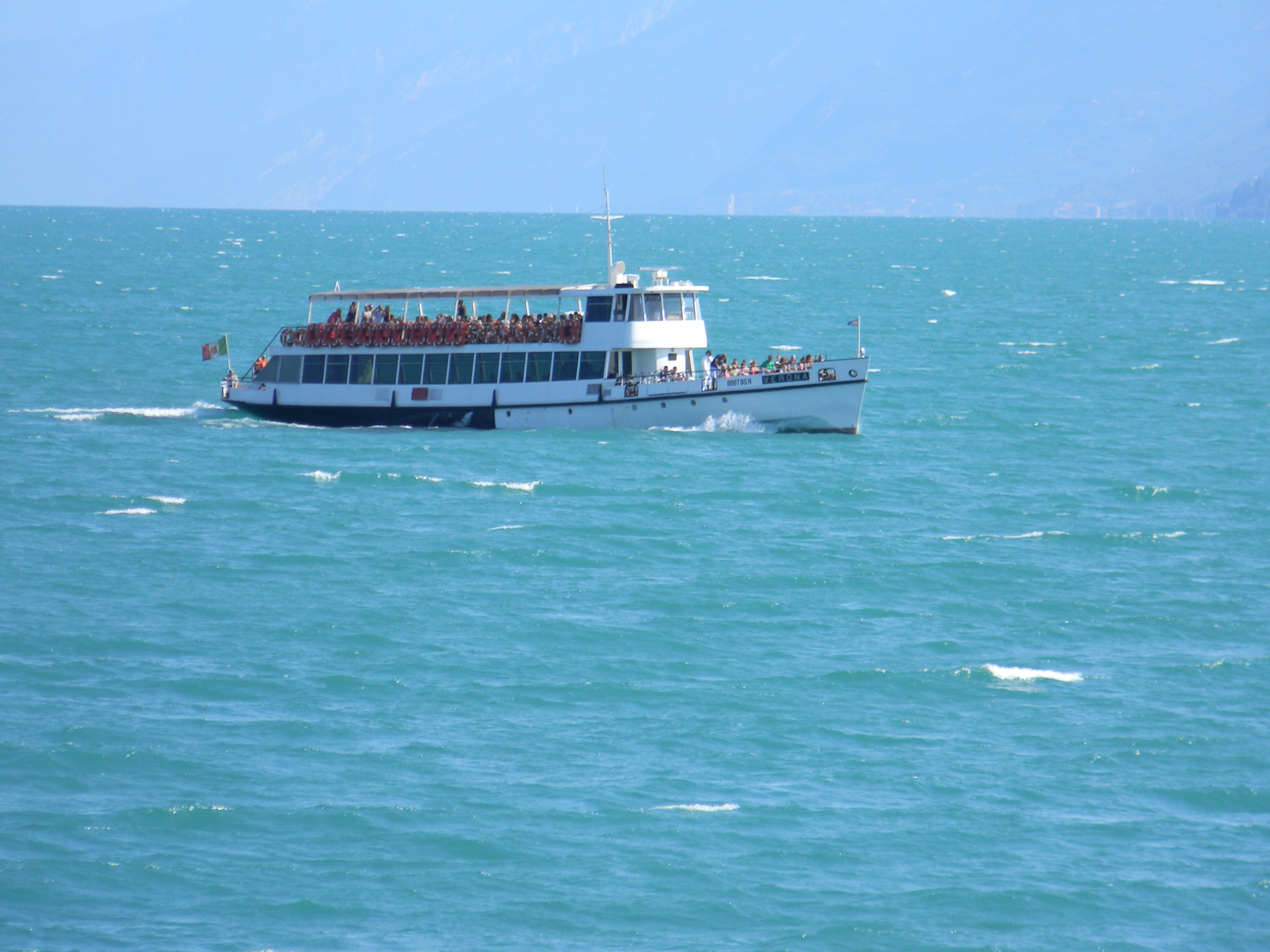 Bâteau Verona (0007 BS N) sur le Lac de Garde, en Italie.